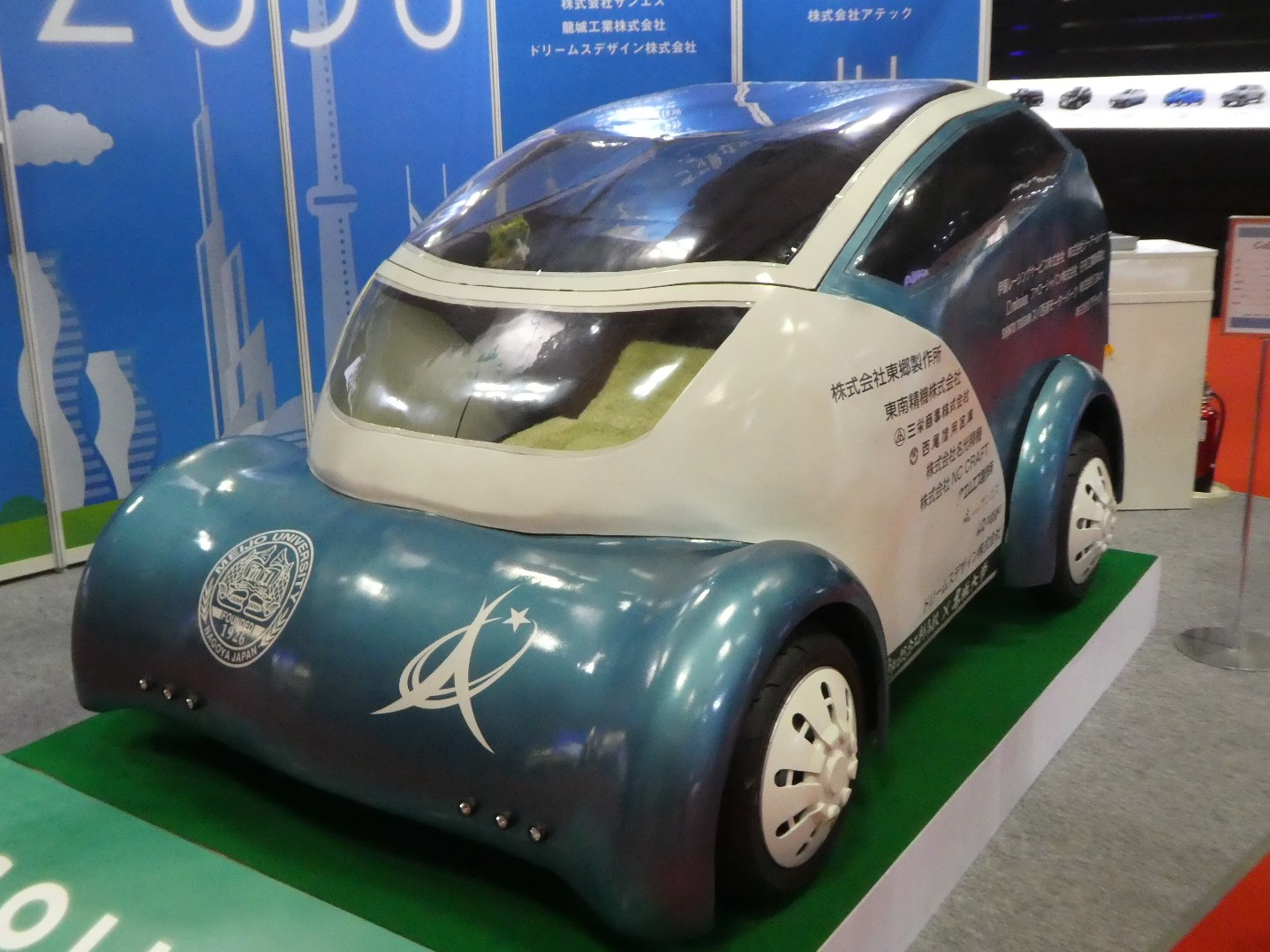 愛知県立愛知総合工科高等学校 専攻科と名城大学が共同制作し、東京モーターショー2017に出展した折り畳み式小型EV(電気自動車)「COLLAPSE(コプラス)」の左斜めからの前景。